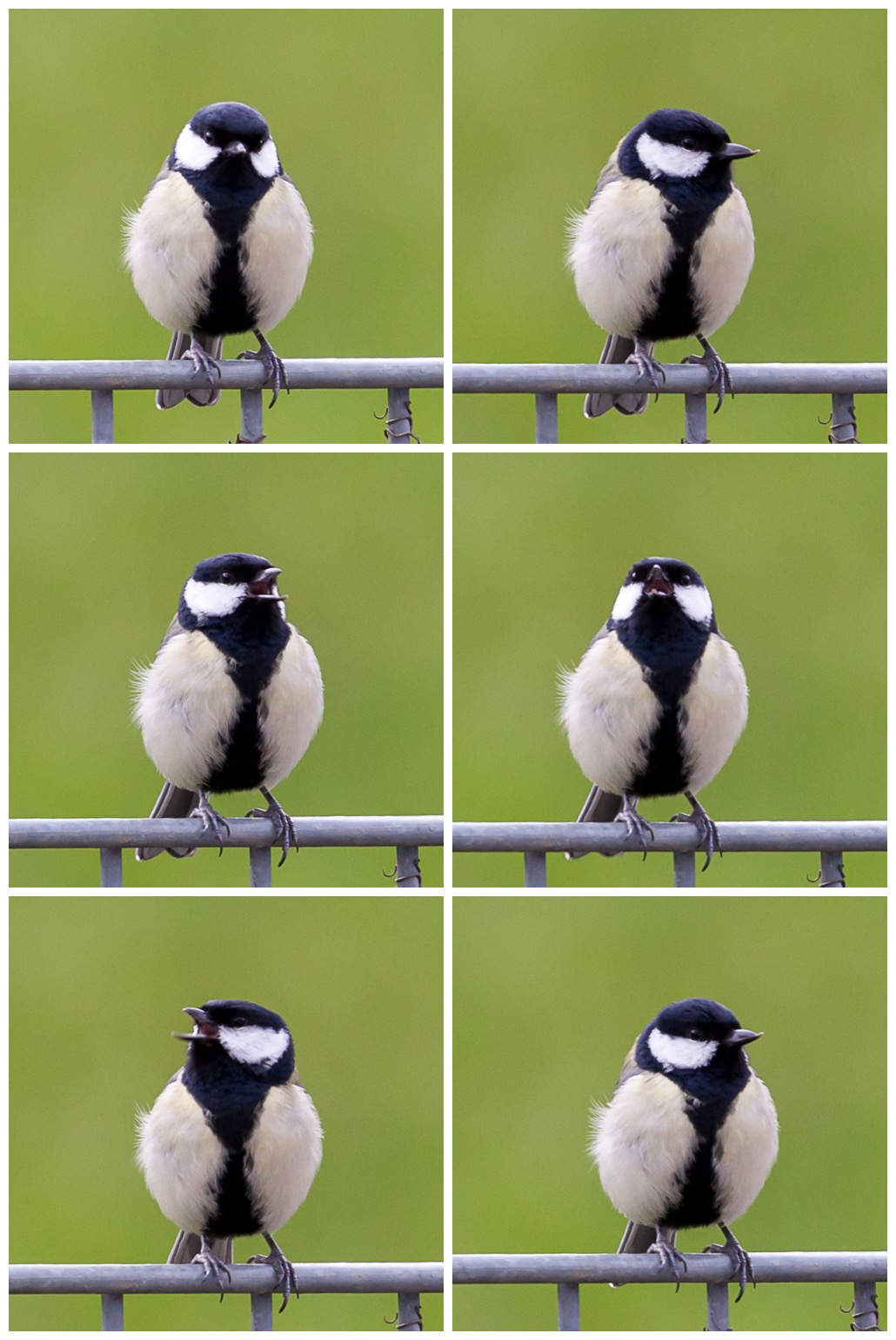 Kohlmeisen Serie. Zwitschernd.